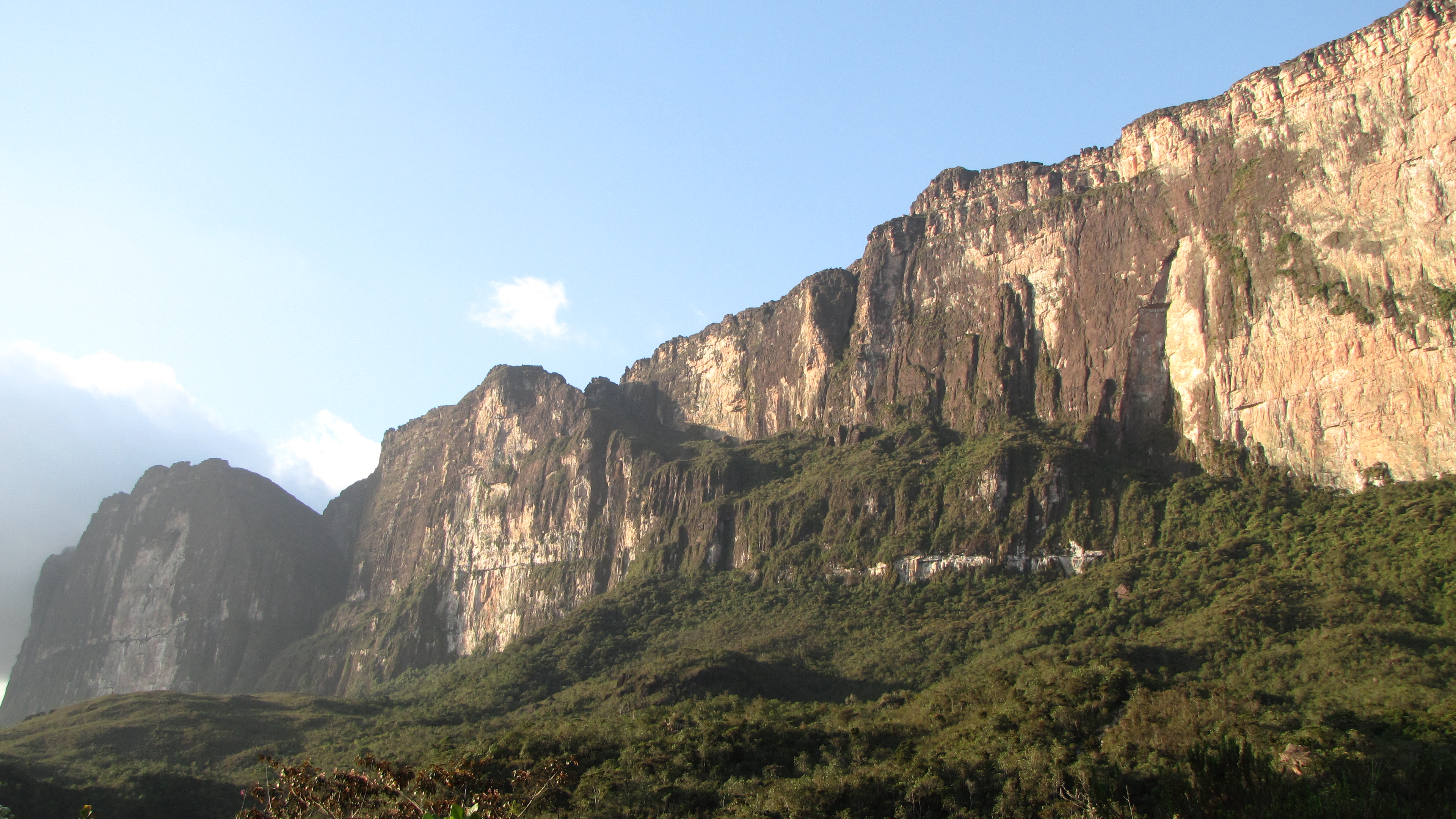 Paratepui Route climbing mount Roraima, Venezuela